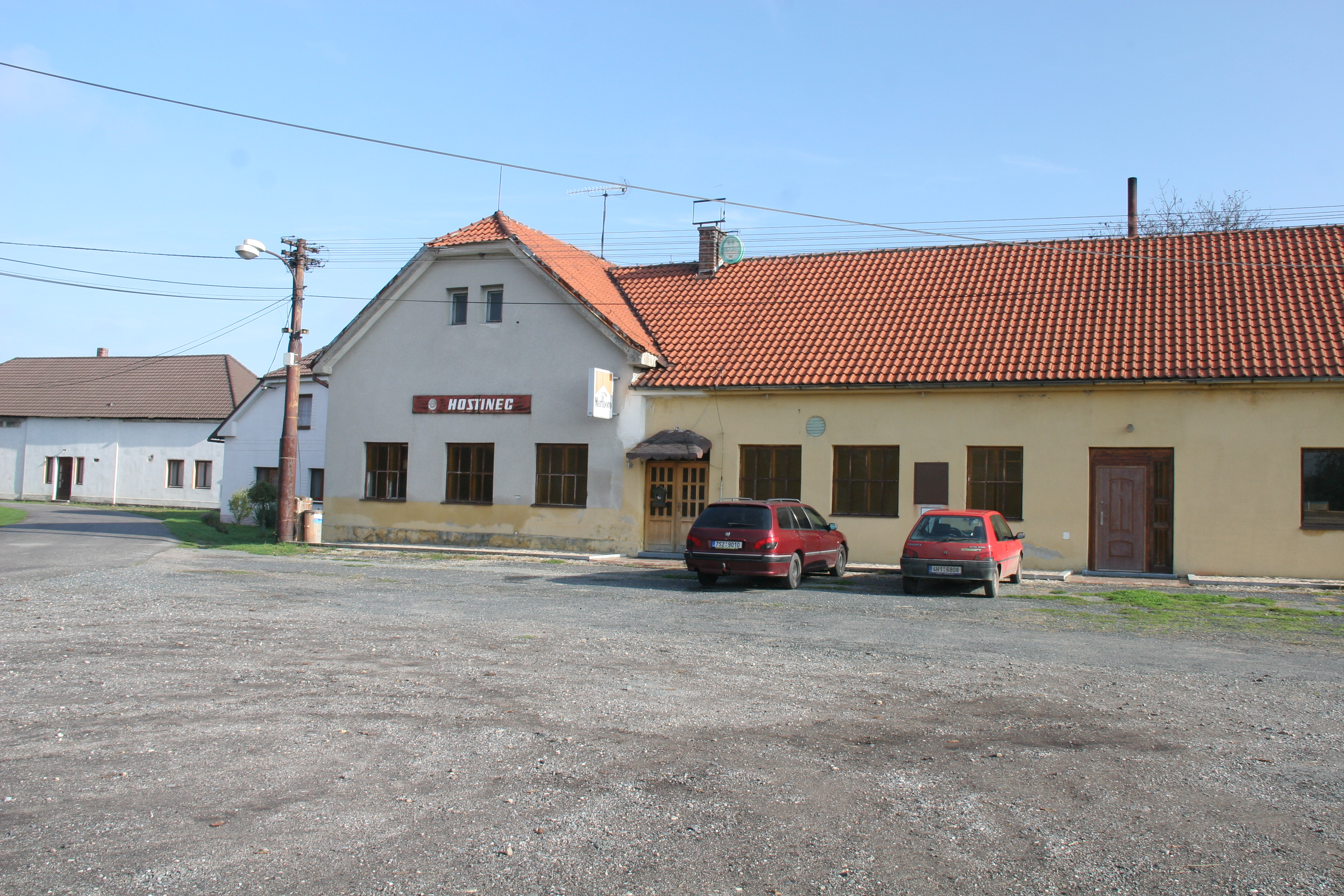 Hradišťko II - hostinec